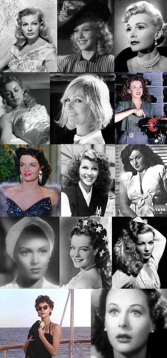 Quadro com as conquistas amorosas hollywoodianas atribuídas ao playboy brasileiro Jorge Guinle.